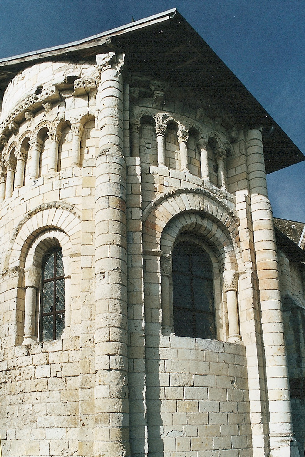 N.-D. Cunault, nördl. Umgangskapelle v. NO